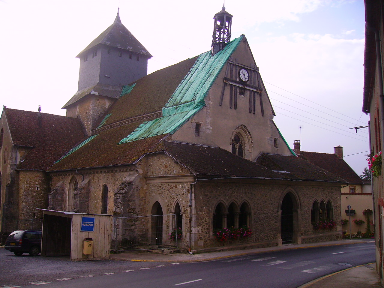 Eglise de Baye (Marne(51), France)